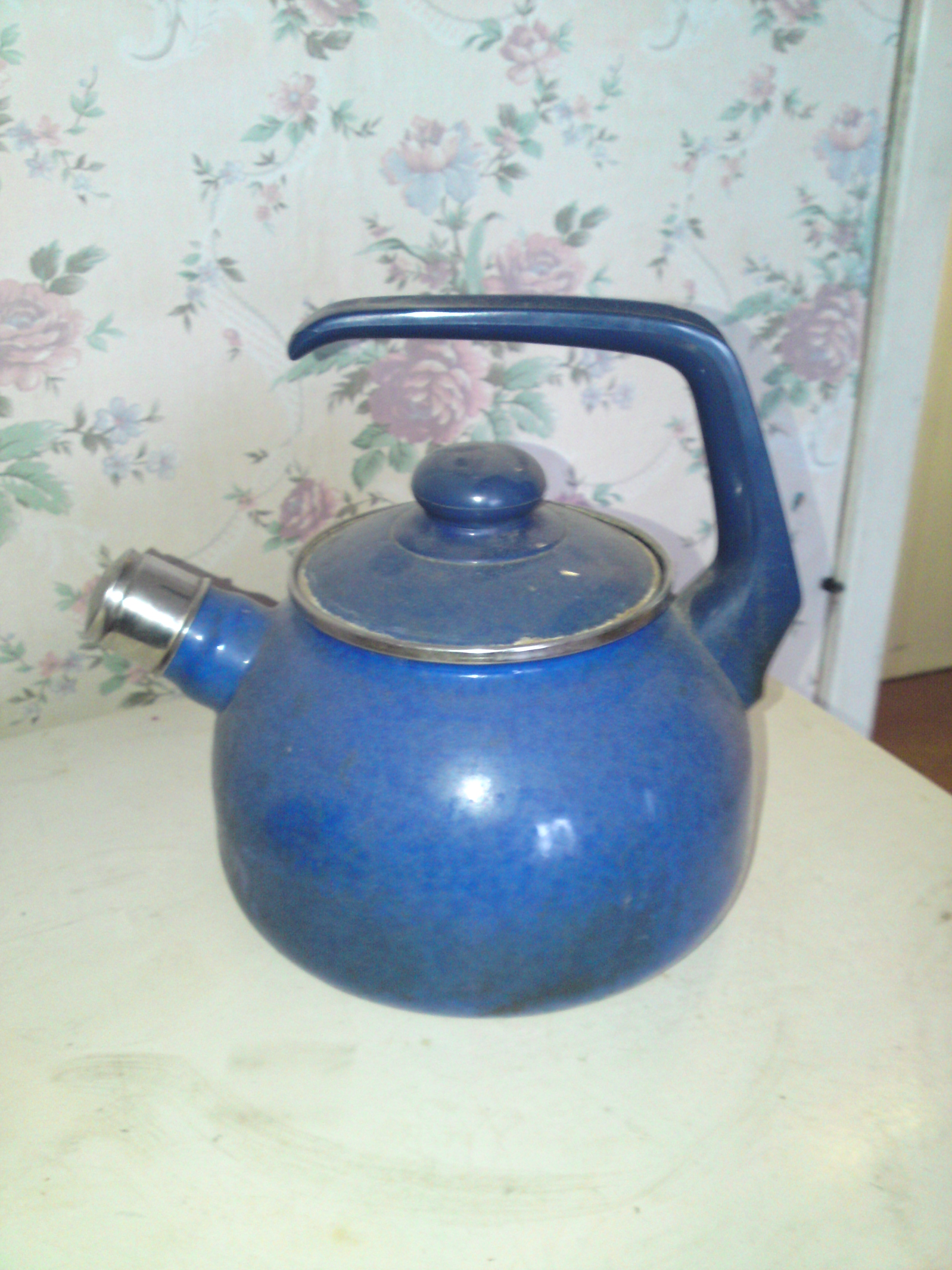 Набор эмалированной посуды, вкл. в себя чайник, кастрюлю, сковороду...